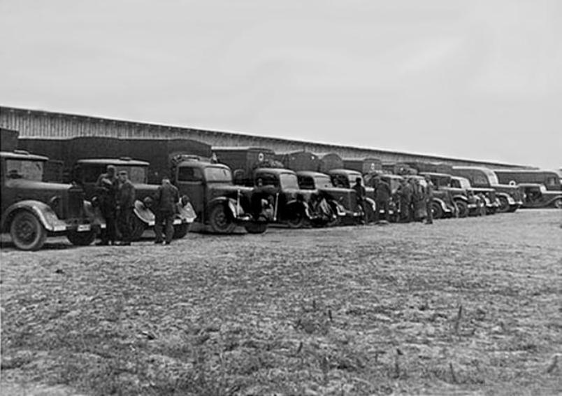 Praschnitz (Przasnysz) 1941, żołnierze Wermachtu w parku samochodowym w koszarach.